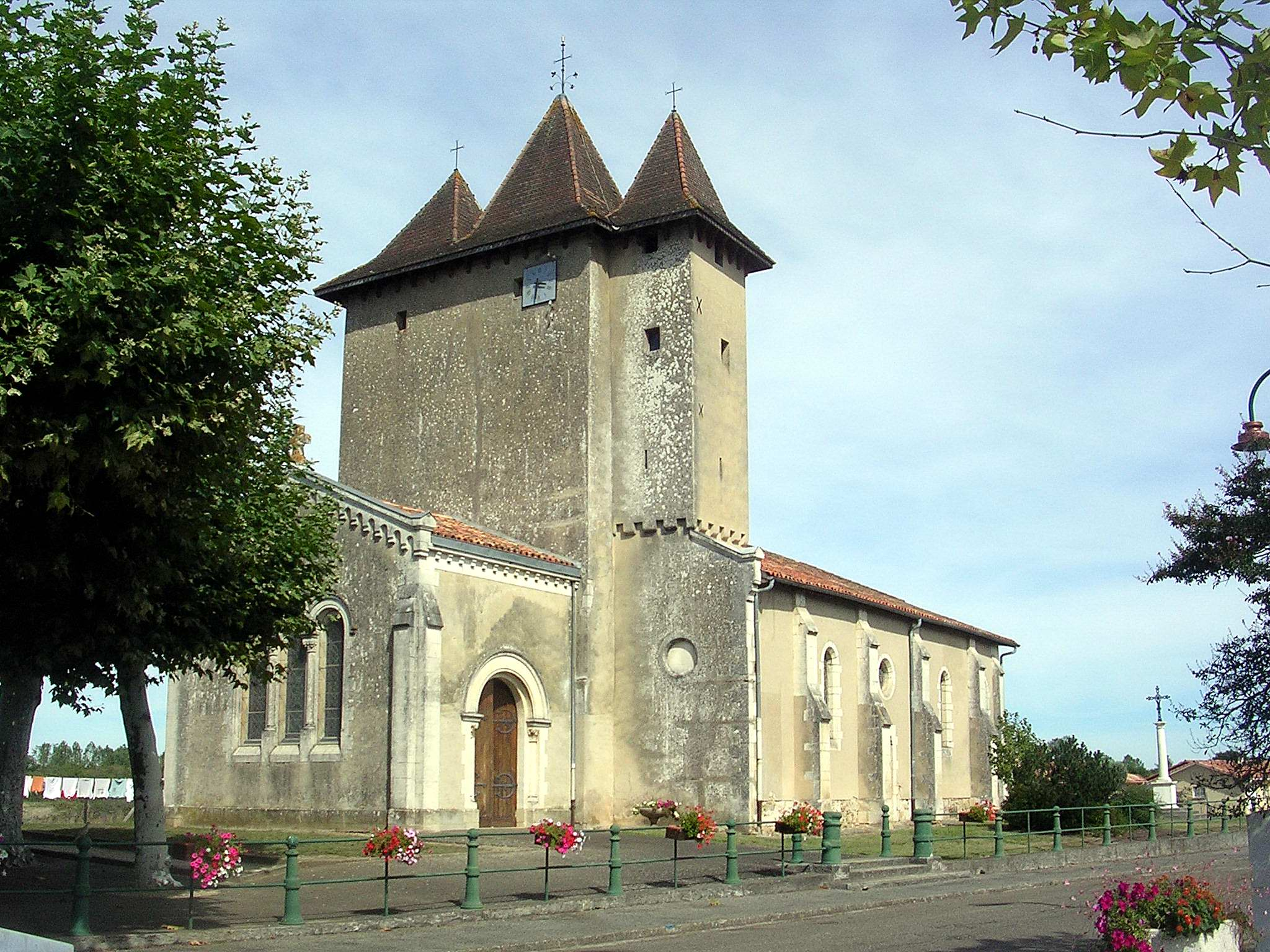 Eglise Saint-Jacques-le-Majeur de Saint-Yaguen, dans le département français des Landes